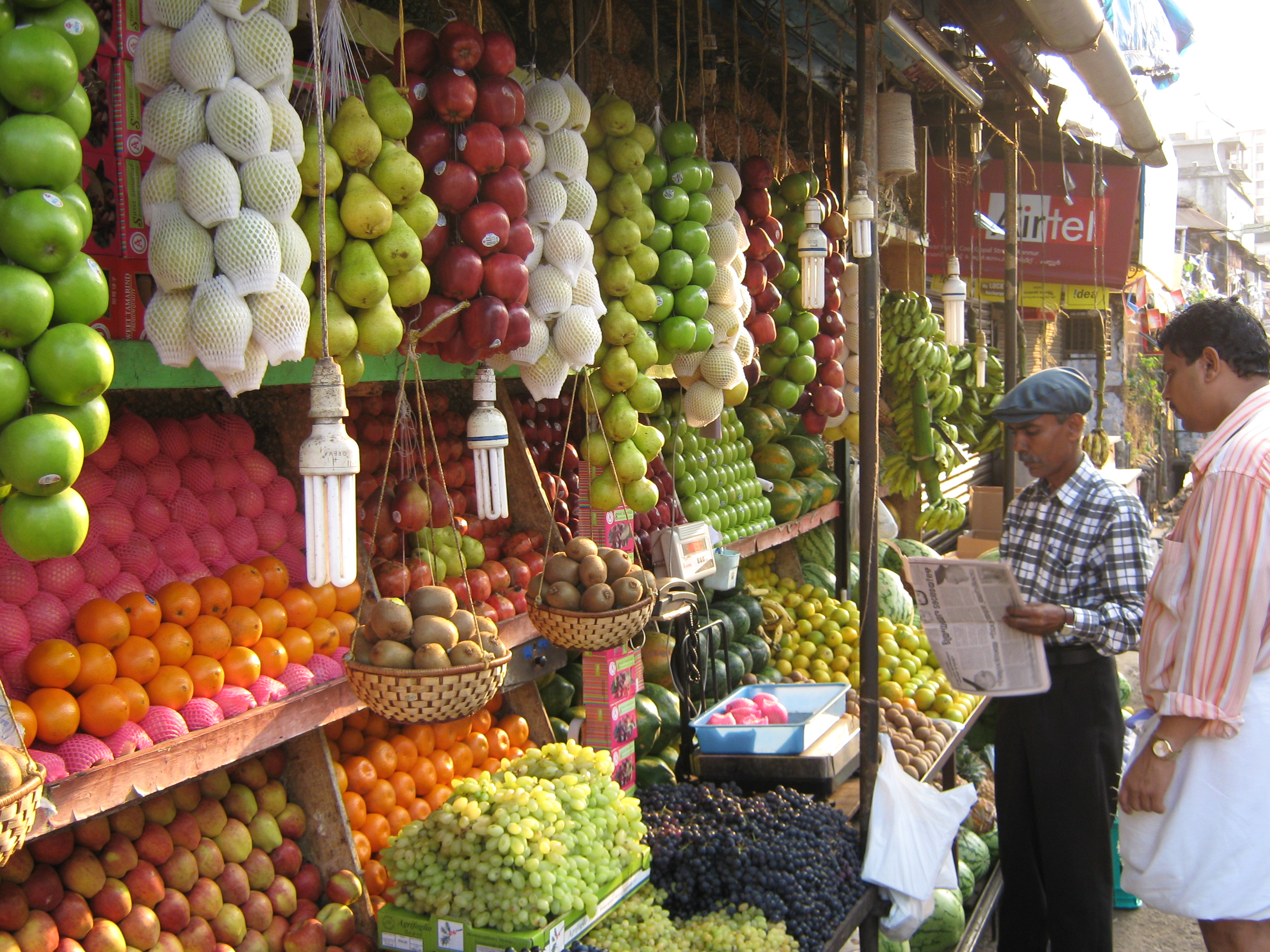 Kannur, Kerala, India.